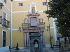 Portada del Instituto Aguilar y Eslava de Cabra-Cordoba-Spain